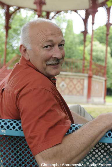 Hubert le Jardinier (Hubert Fontaine)